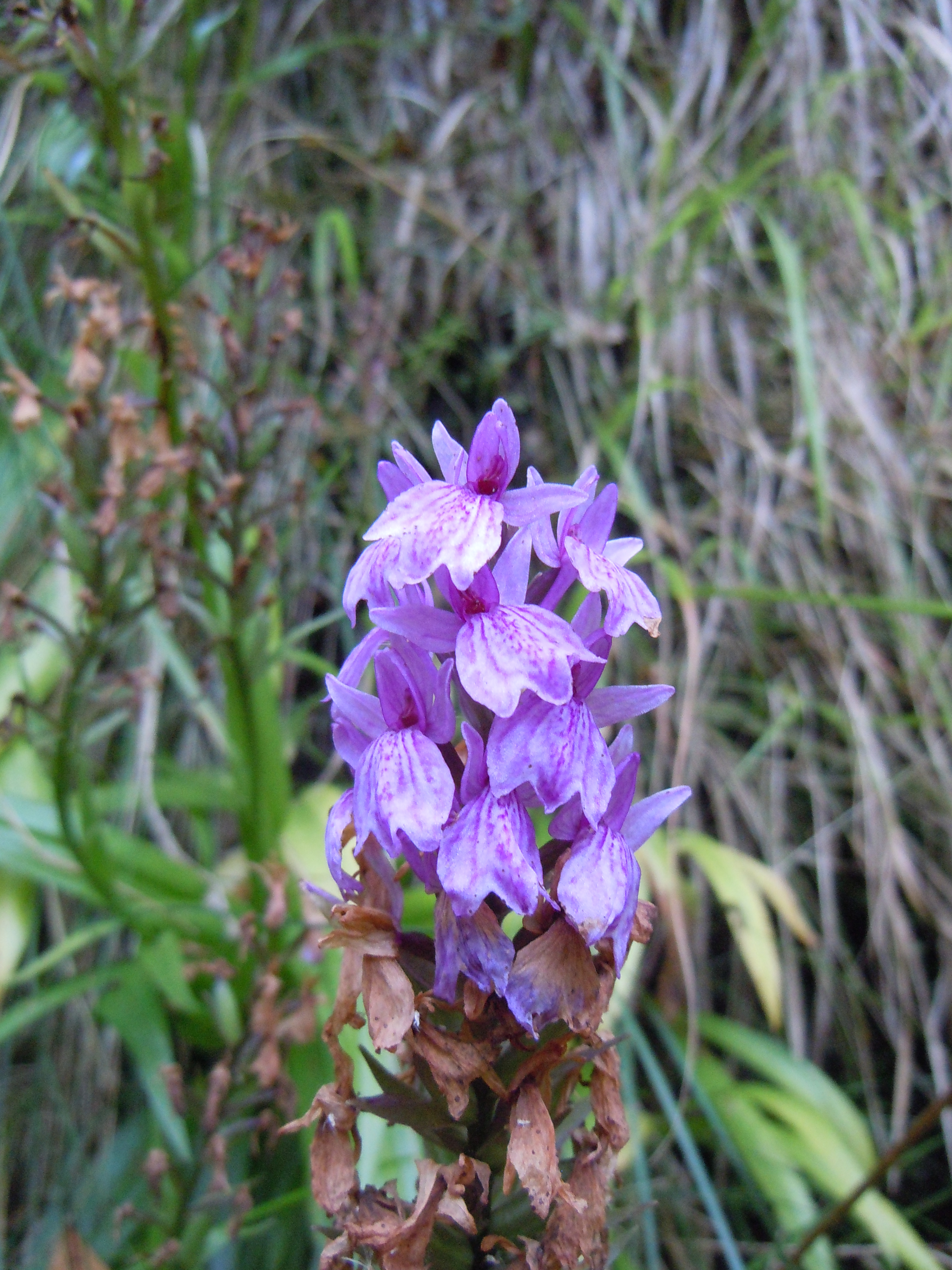 Dactylorhiza foliosa - Levada do Caldeirão Verde - Madere